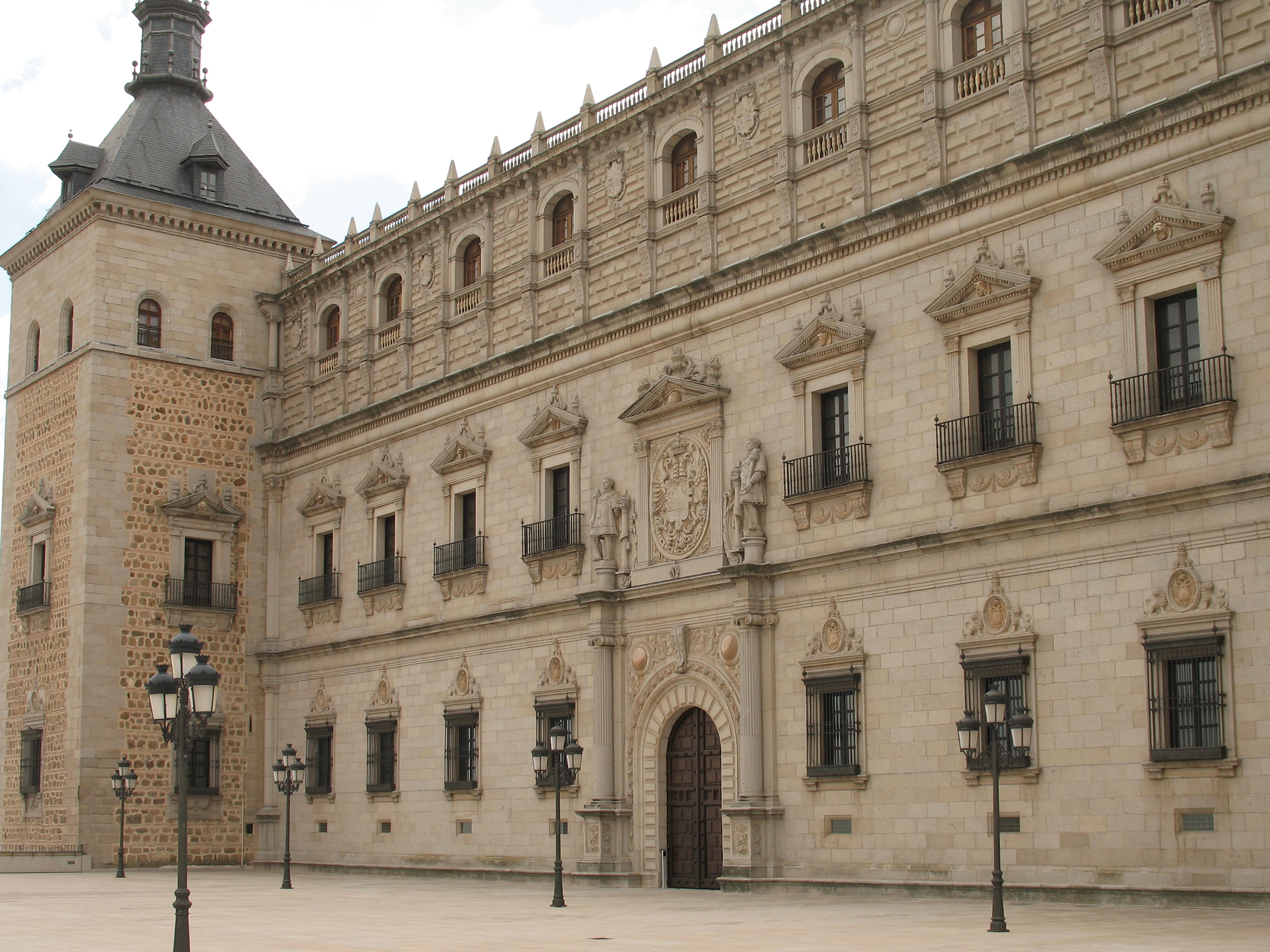 Fachada de Covarrubias del Alcazar de Toledo.